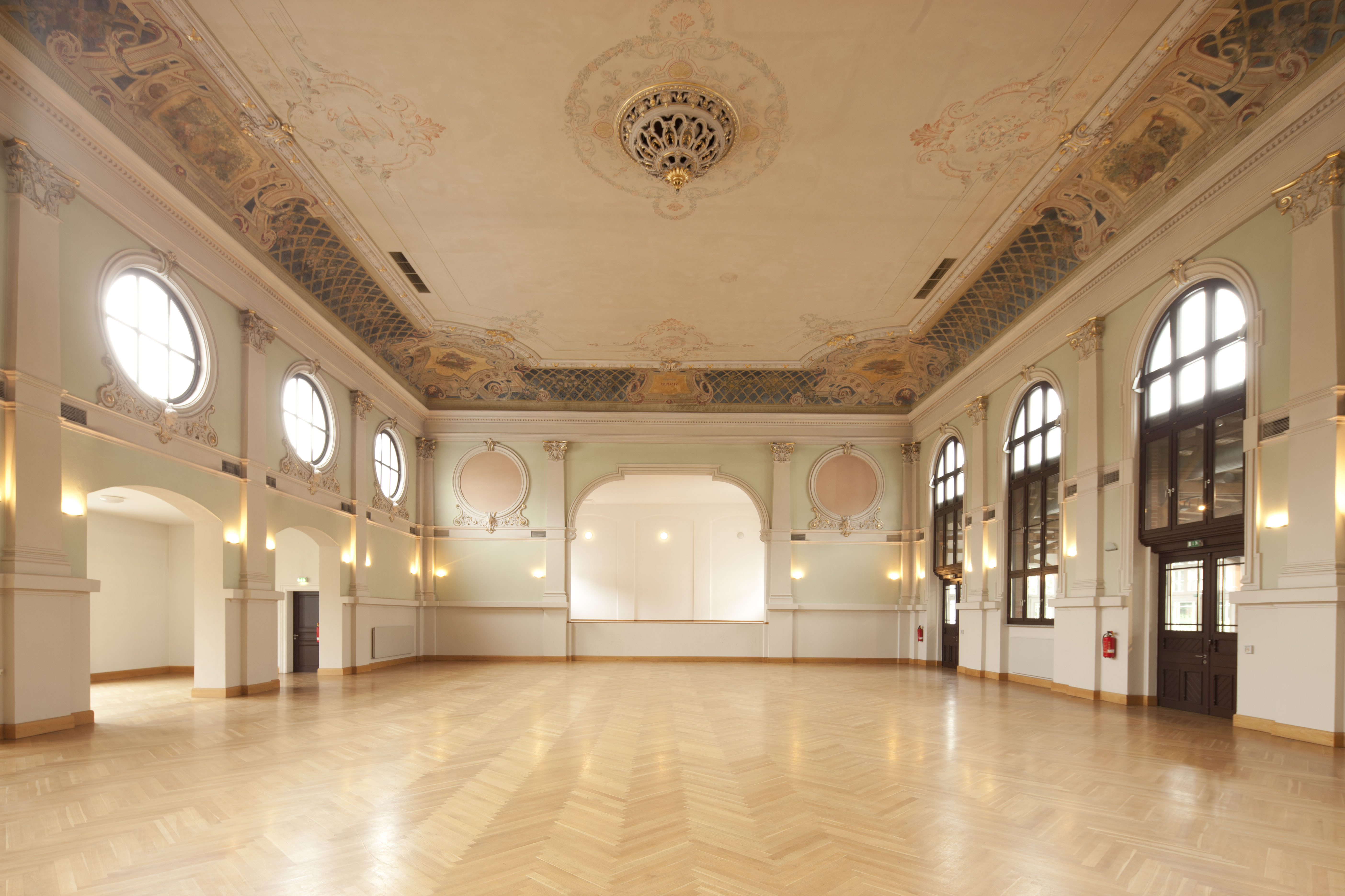 Ballhaus Pankow - Ballsaal